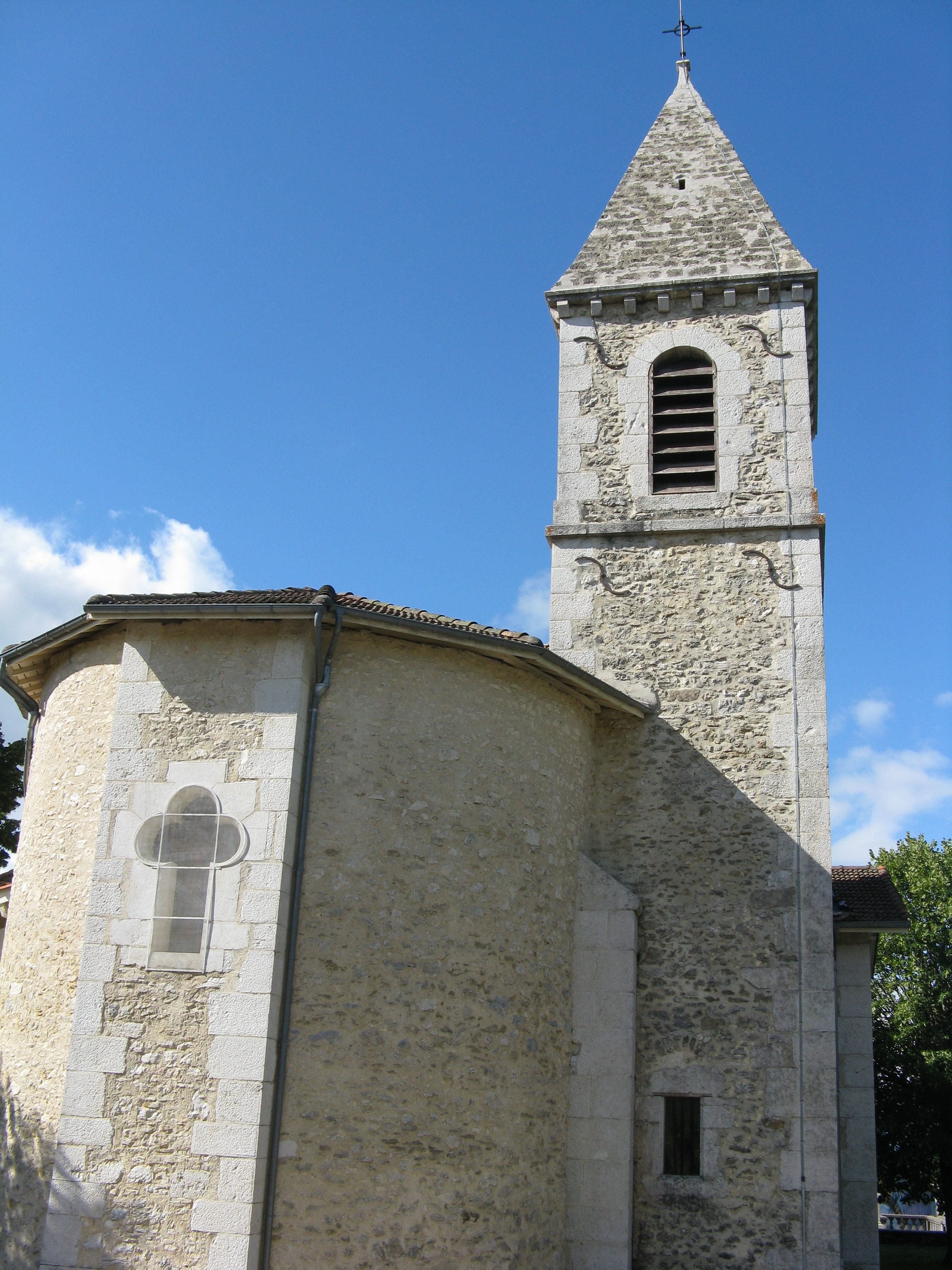 Presles - Eglise